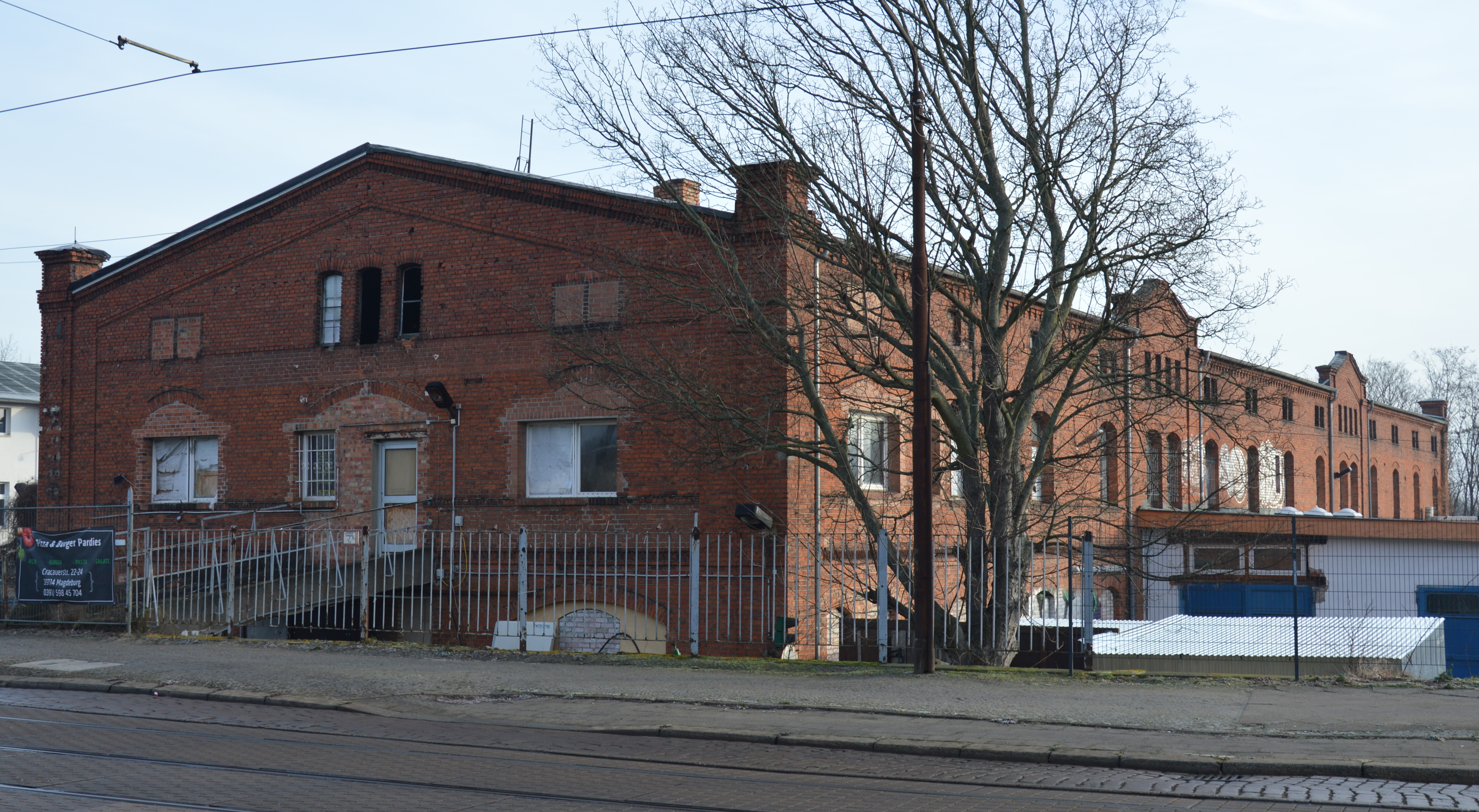 Turmschanzenstraße 2